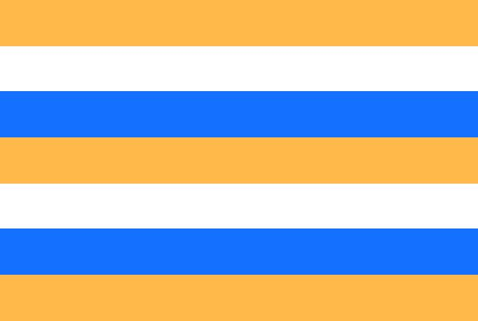 Versión heptabarrada de la Prinsenvlag